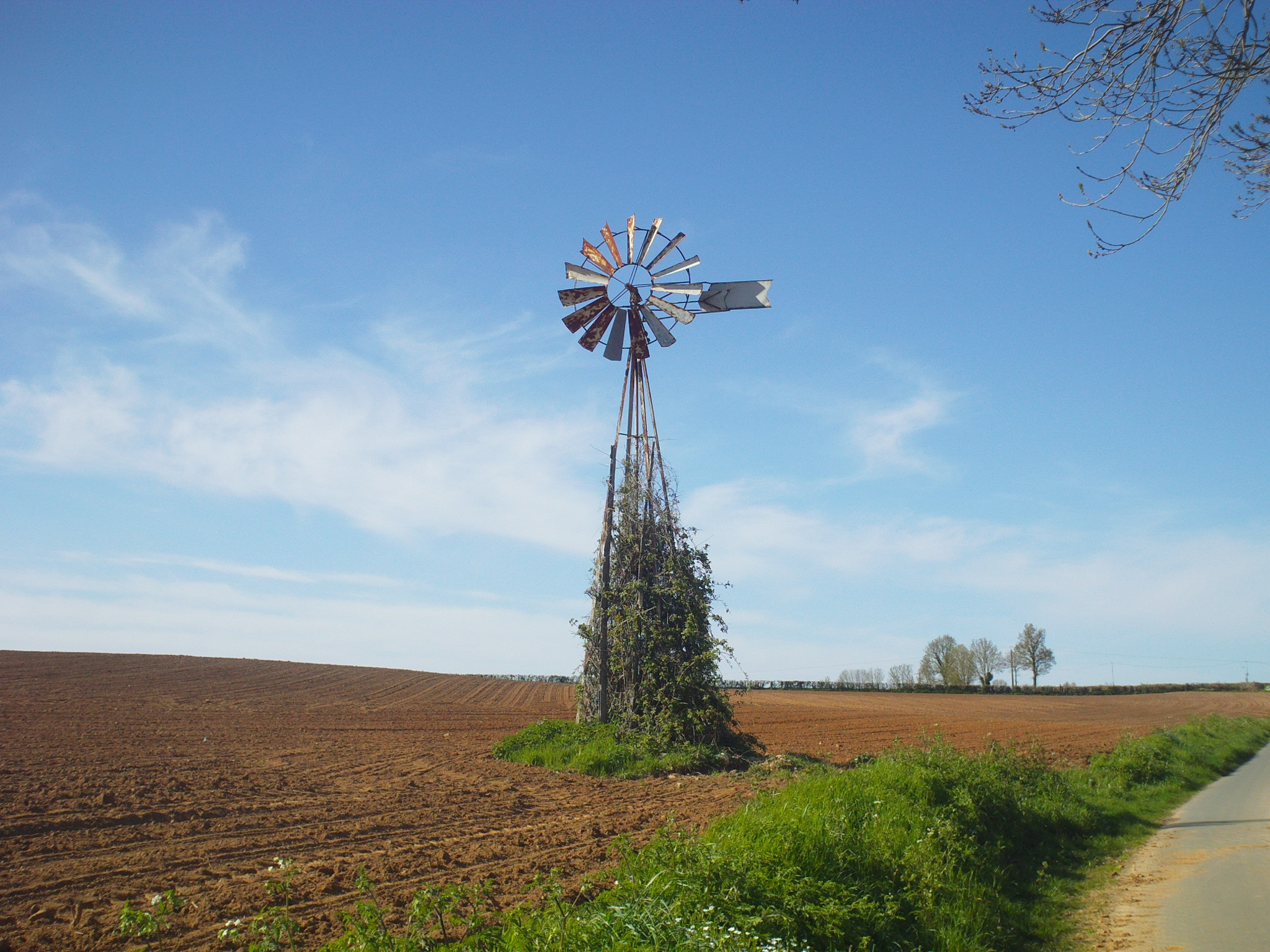 Ancienne éolienne de pompage (XXème siècle) installée dans la plaine, à l'est de la commune de la Chapelle-Bâton (Deux-Sèvres, France). Son rôle était de pomper l'eau d'un puits, situé dessous l'éolienne. Elle est aujourd'hui hors d'usage.